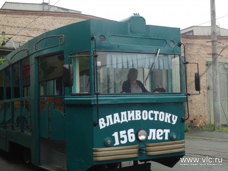 Трамвай РВЗ-6М2 № 251 «Владивостоку 156 лет» с открытым правым бортом